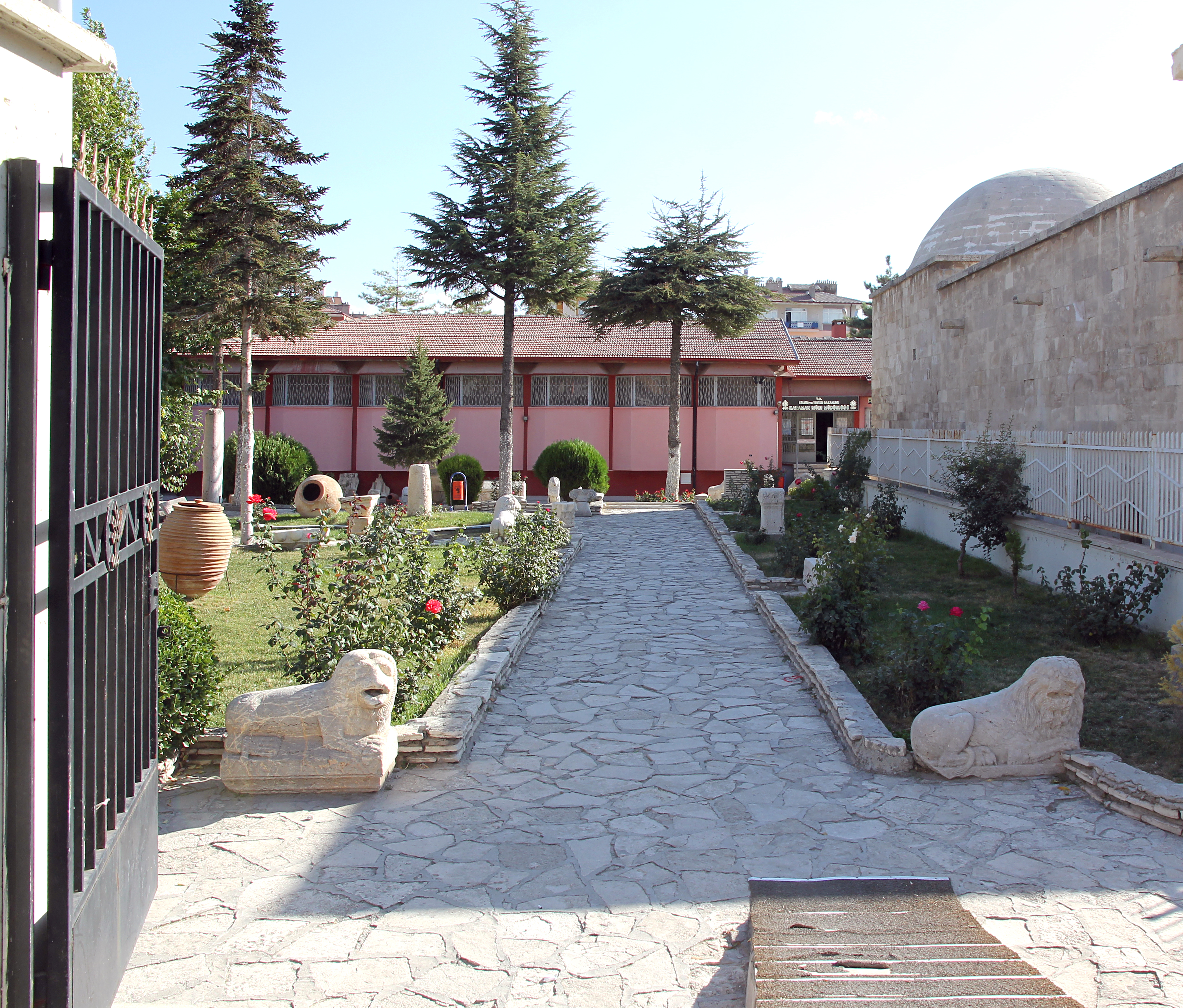 Archäologisches Museum Karaman, Südtürkei